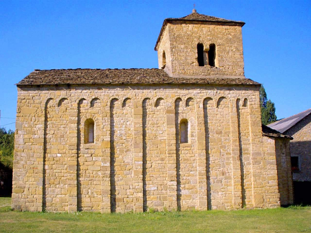 Iglesia de San Caprasio, en Santa Cruz de la Serós (Huesca)